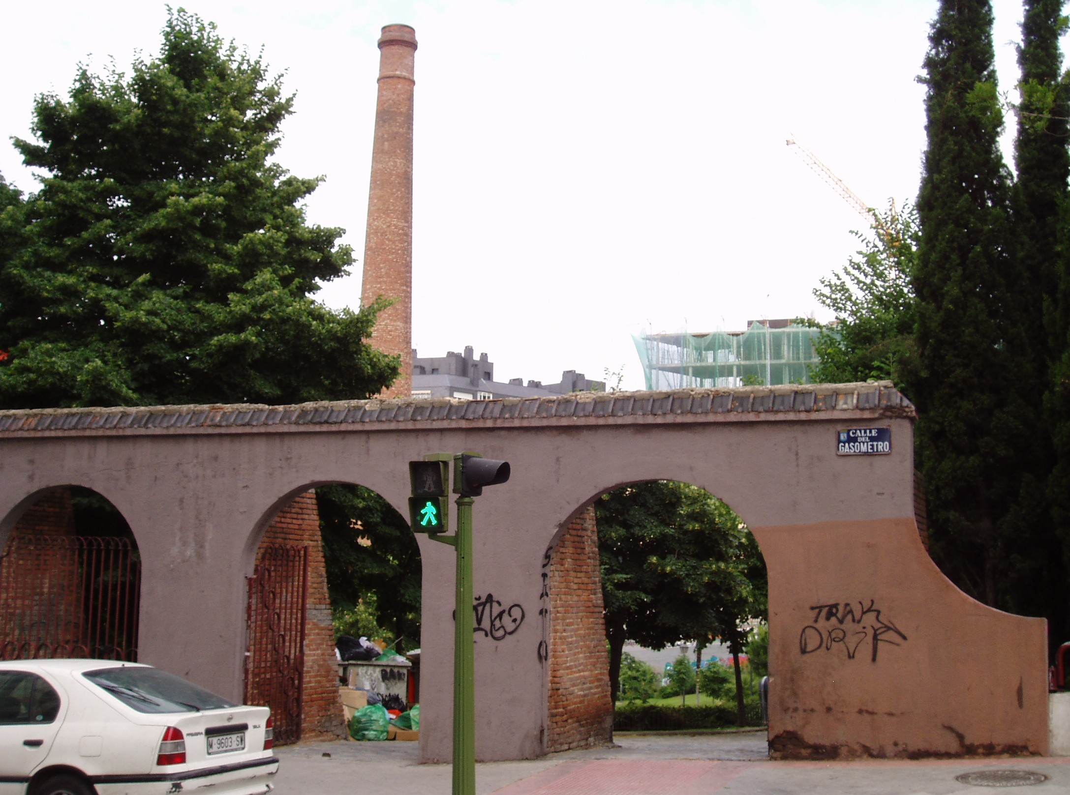 Parque del gasómetro. Barrio de las Acacias. Arganzuela. Madrid. España